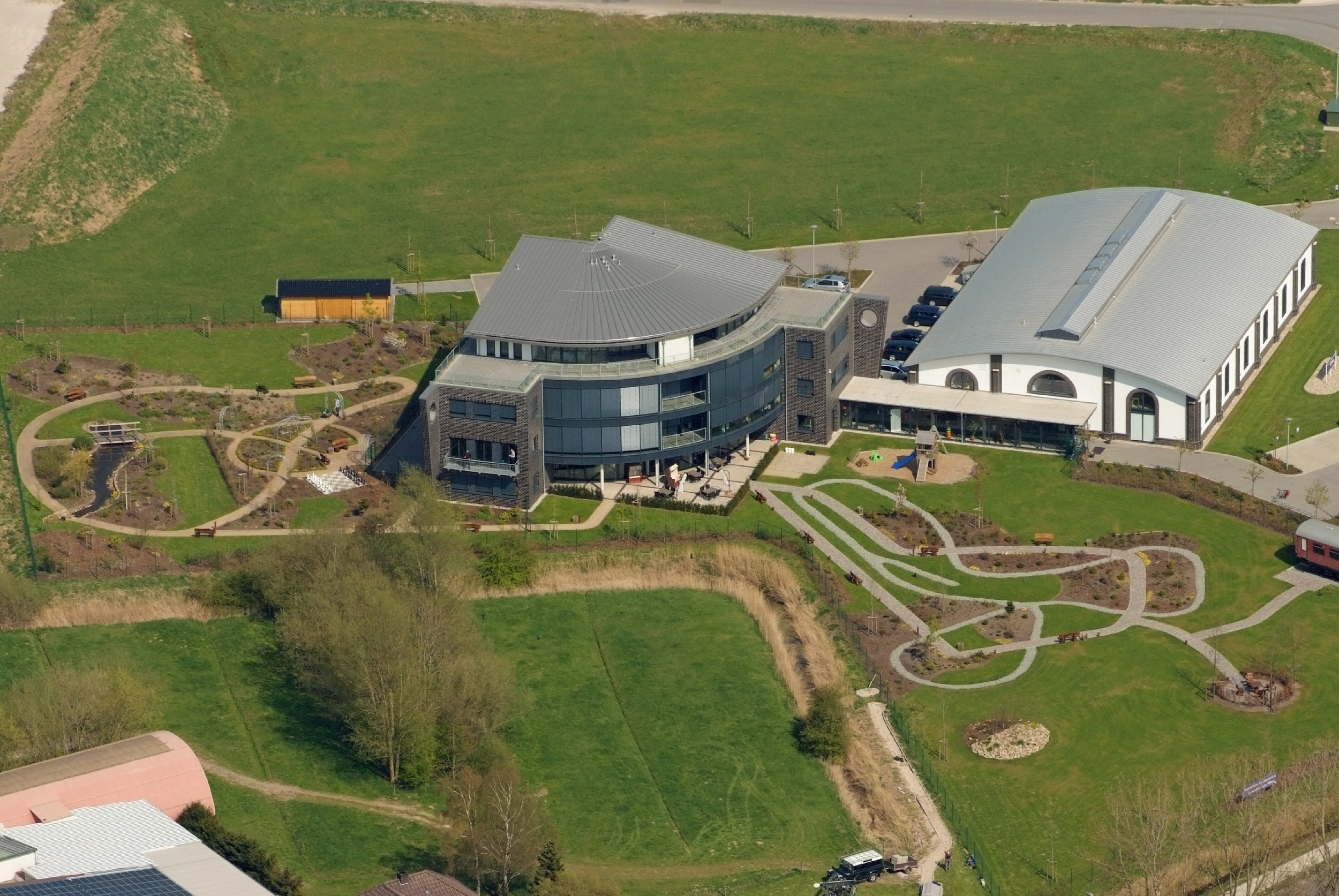 Fotoflug von Nordholz-Spieka nach Oldenburg und Papenburg